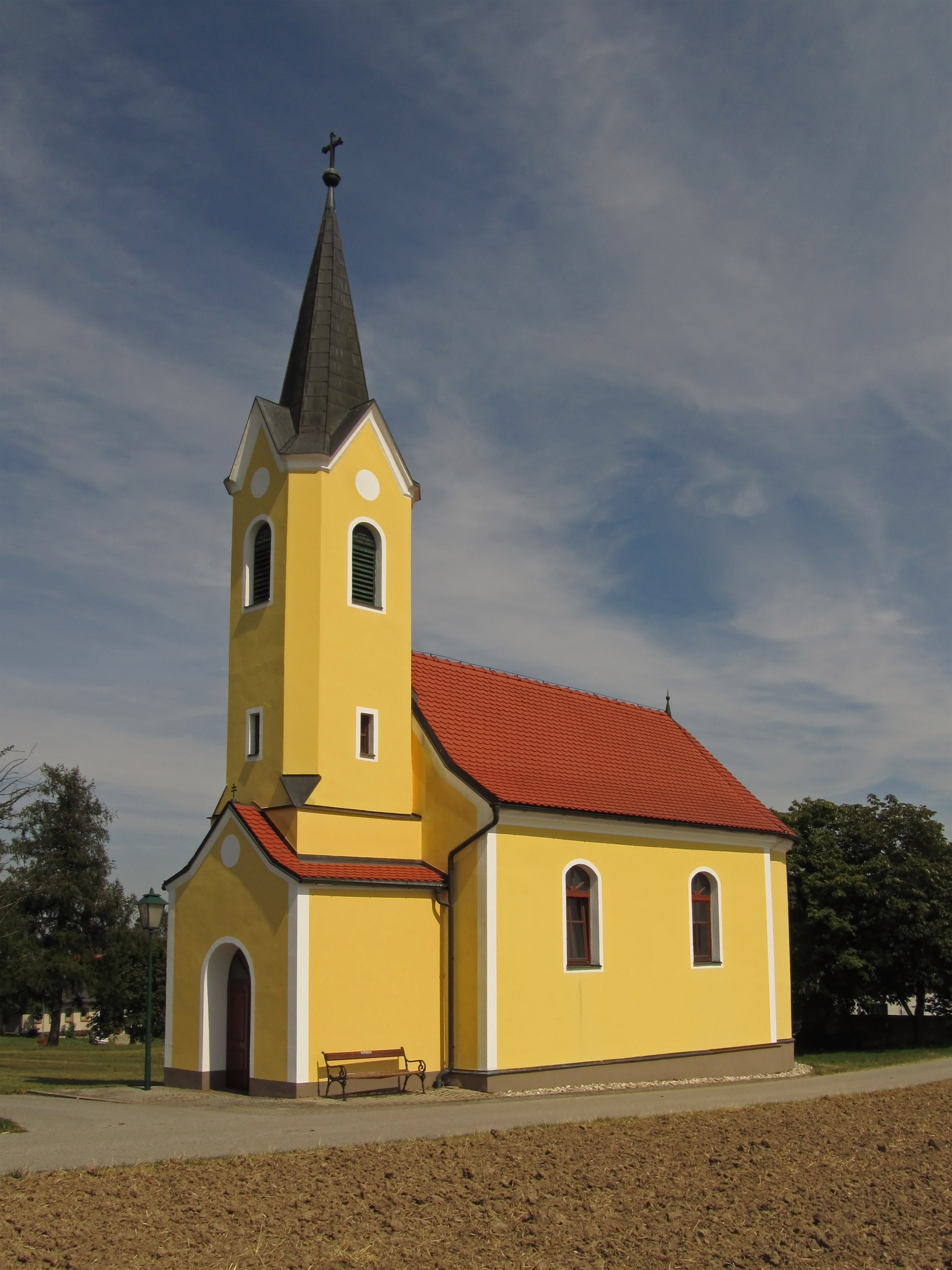 Die Ortskapelle am nördlichen Angerrand von Gradnitz ist ein schlichter, rechteckiger Bau von 1726 mit rundem Schluss. Über einer Vorhalle erhebt sich ein Turm von 1908 mit Spitzgiebel und Spitzhelm. Der Innenraum ist flachgedeckt, die Apsis verfügt über ein Spitzkappengewölbe. Der frühbarocke Altar aus der Zeit um 1860 hat einen Aufbau mit gesprengtem Giebel und seitlichem Knorpelwerk sowie eine Schnitzgruppe Gnadenstuhl hinter rechteckigem Rahmen. Zur Ausstattung zählen gotische Figuren der Hll. Florian und Leonhard, eine barocke Figur Maria mit Kind aus dem 18. Jahrhundert, ein barockes Kruzifix vom Ende des 17. Jahrhunderts (?) und barocke Figuren der Hll. Joachim und Anna aus der Mitte des 18. Jahrhunderts.